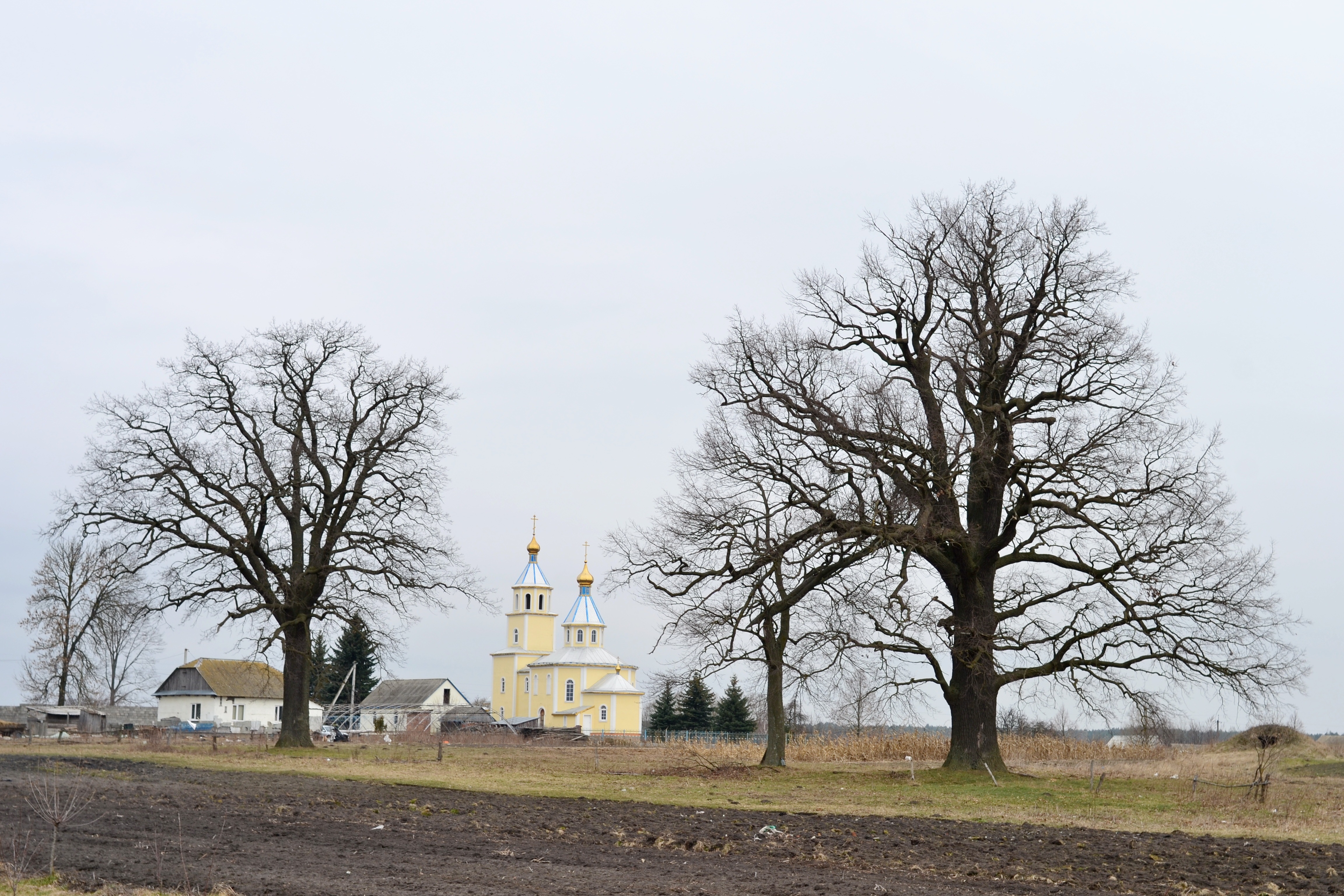 «Дуби велетні звичайні» - пам'ятка природи ботанічна (Волинська область, Ковельський р-н, с. Волошки. Колодяжненська сільська рада) - вигляд зі сходу